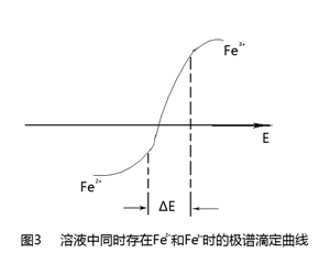 中文（中国大陆）: 安培滴定法图